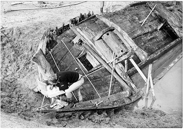 bij de Gordiaandreef te Lelystad; het meten en tekenen van het achterdek Objectnummer: [MA]F-83187